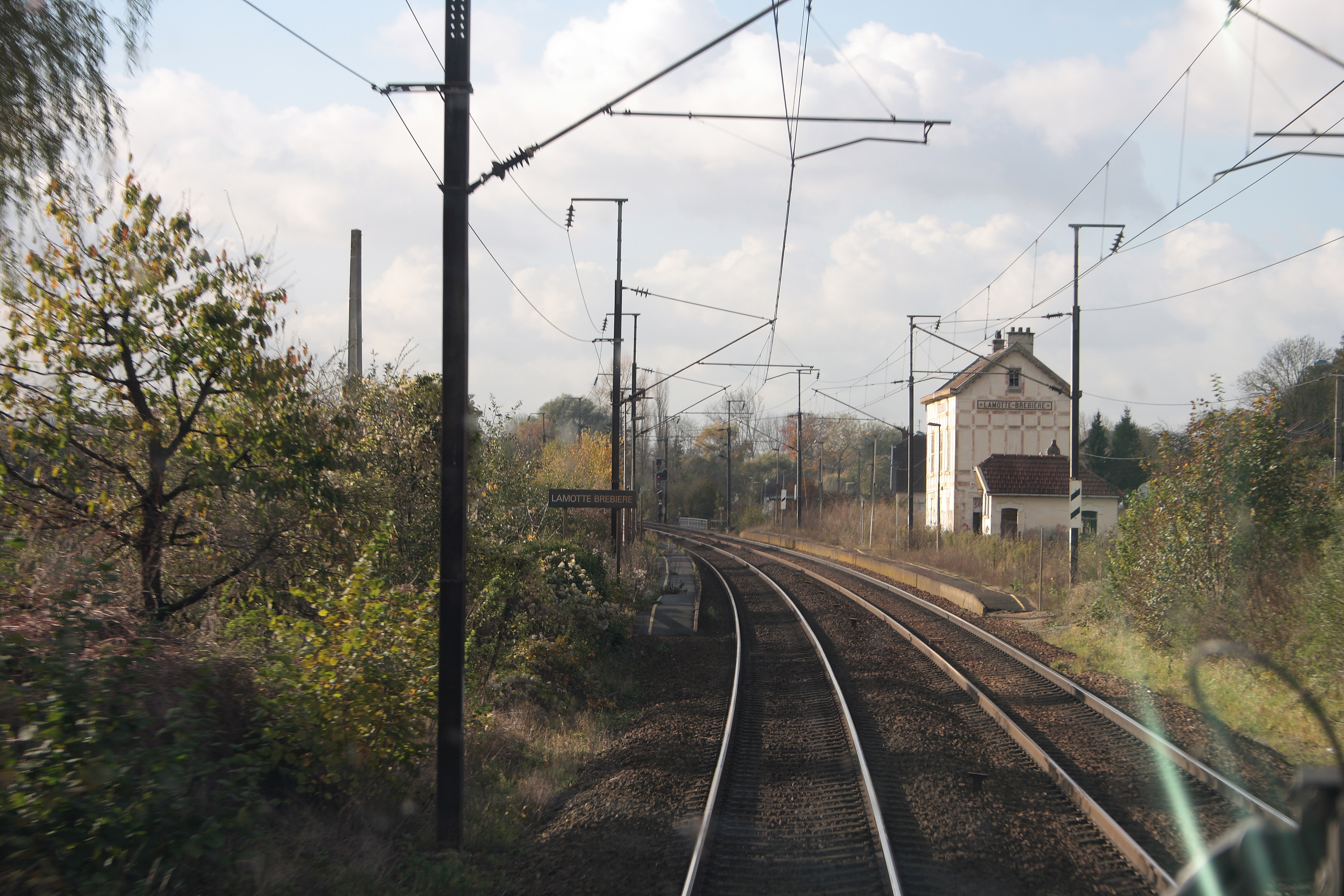 Gare de Lamotte-Brebière : voie 2.